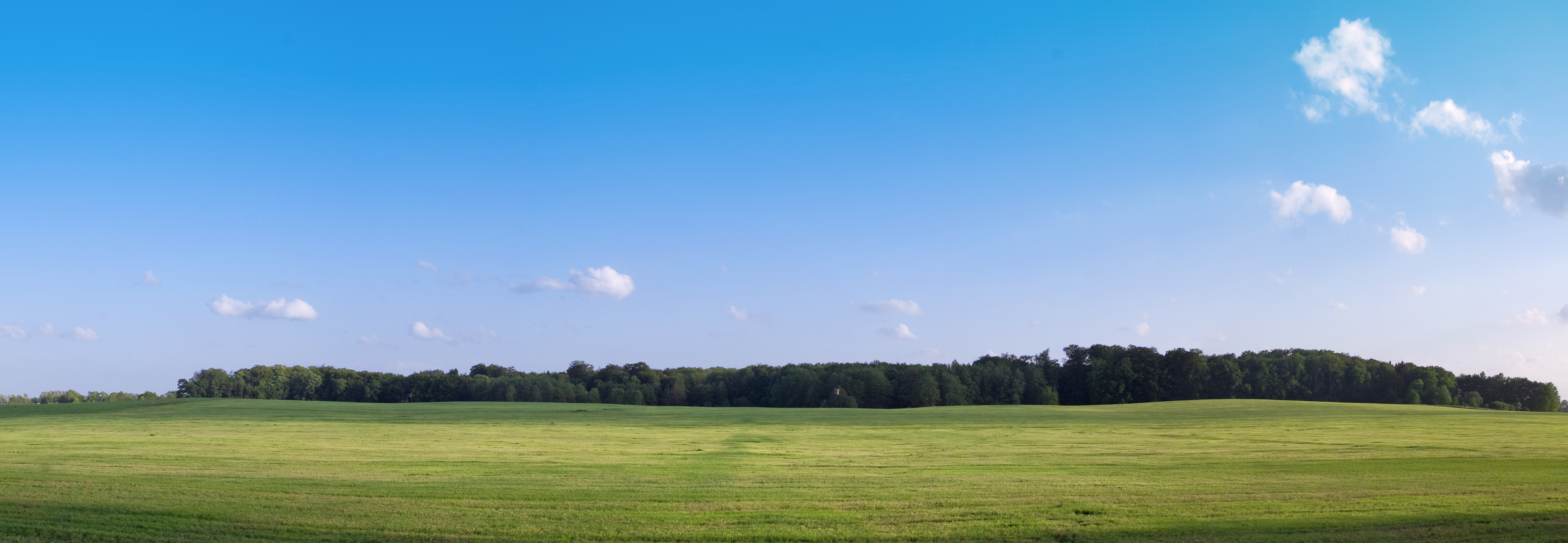 Blick auf das zwischen Pokrent und Neuendorf befindliche Waldgebiet "Gabeler Heide"